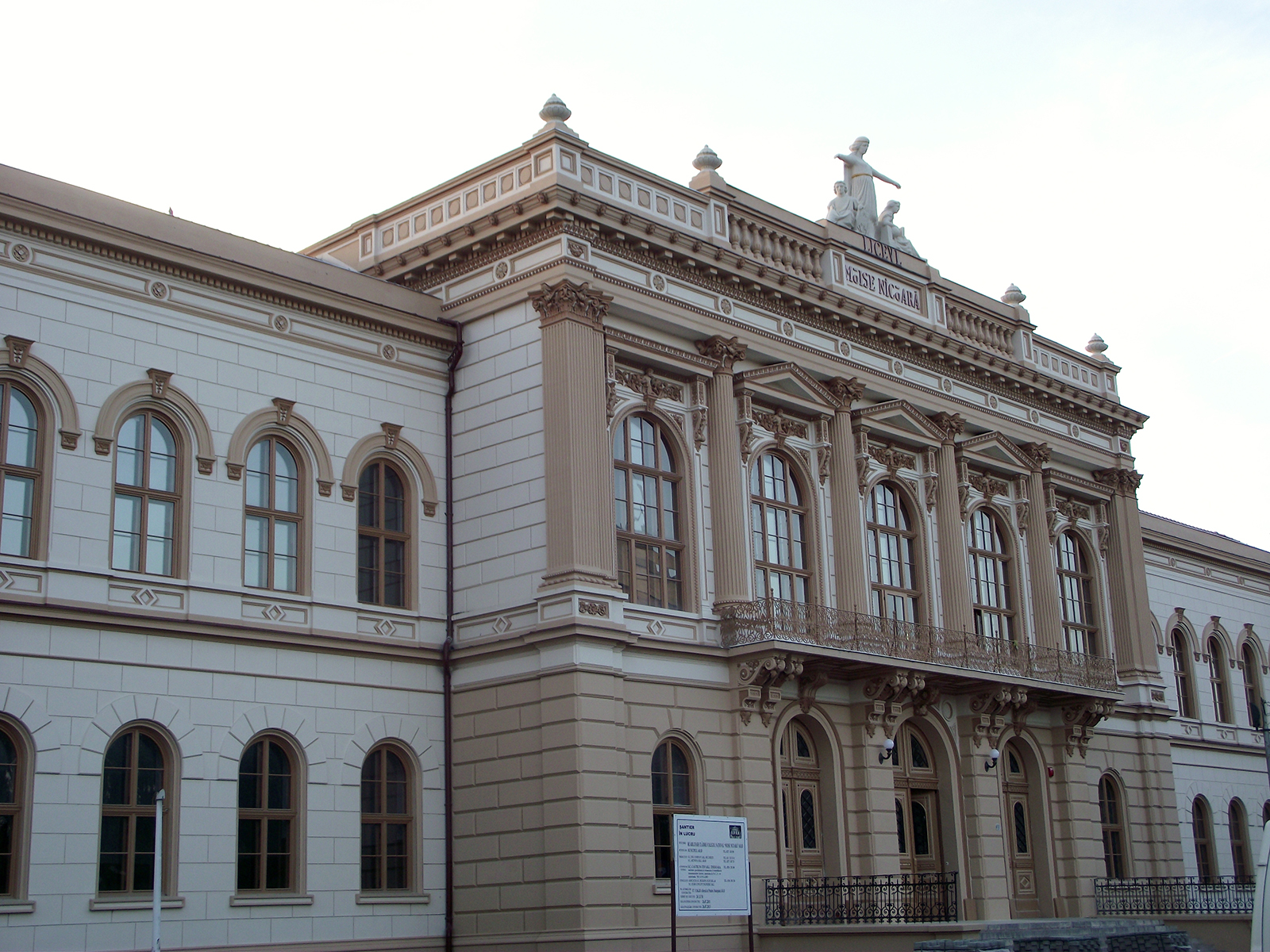 Faţada clădirii Colegiului Naţional Moise Nicoară din Arad dupa renovarea încheiată în 2013.